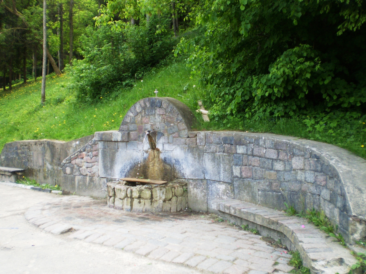 "Marijos Ašarų" šaltinis šalia Ariogalos